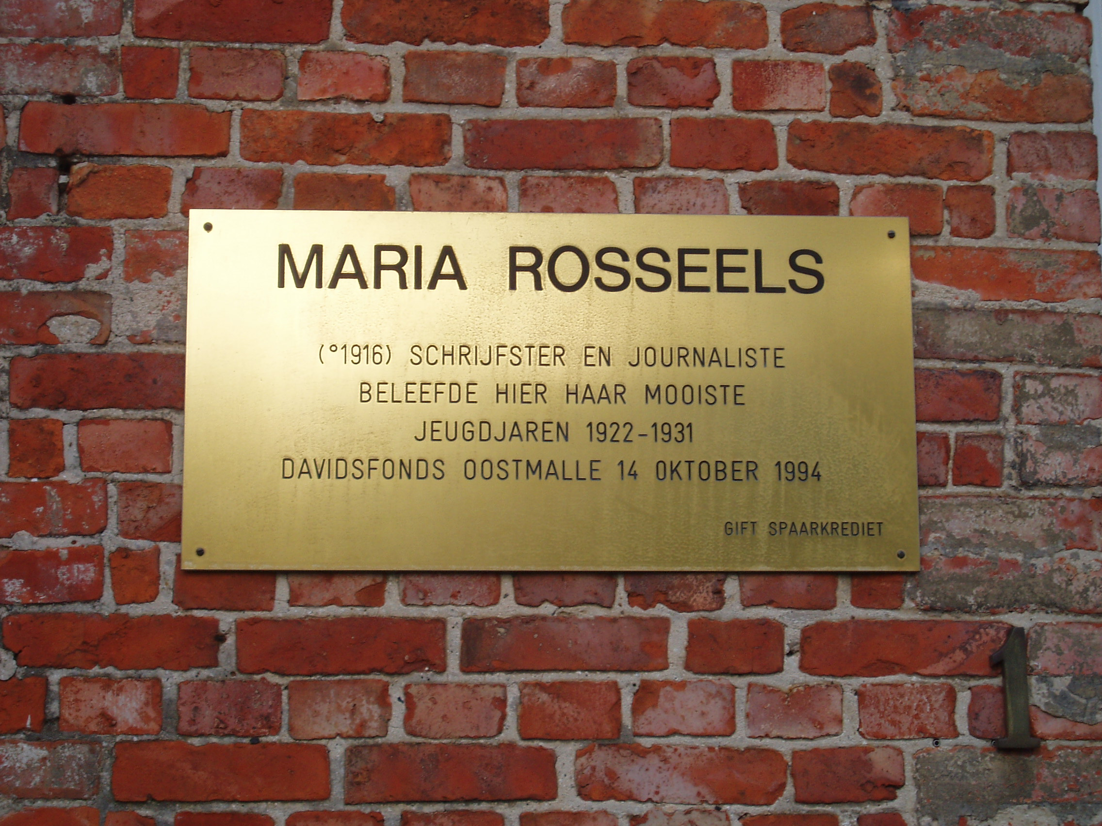 Plaat woonhuis Maria Rosseels